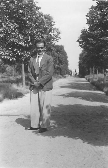 Walter Hollstein (1936), während seiner Zeit bei Werder Bremen